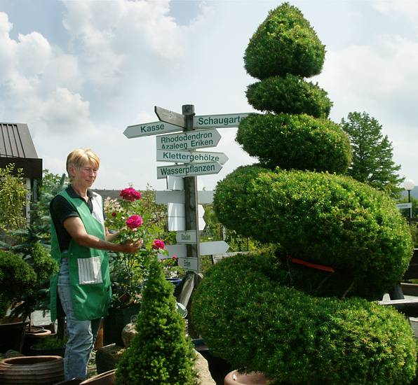 Die Löbauer Baumschule, gegründet 1864